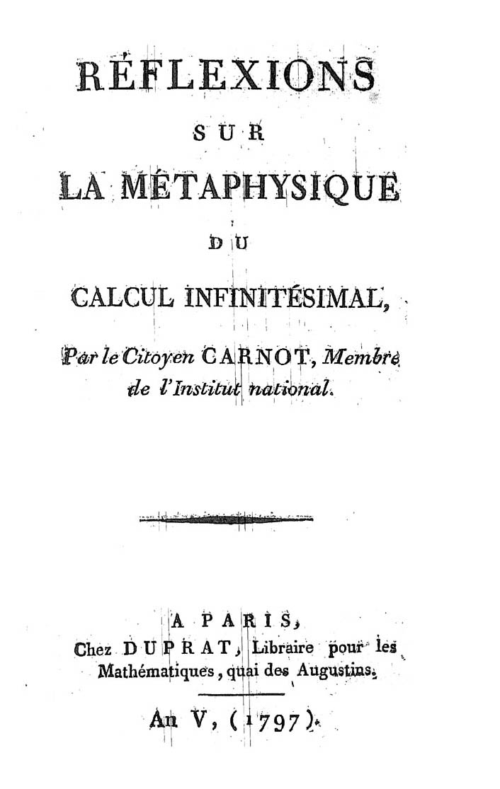 Réflexions sur la métaphysique du calcul infinitésimal. - A Paris : chez Duprat, 1797. - 80 p., 1 c. di tav. ripiegata ; 8º.